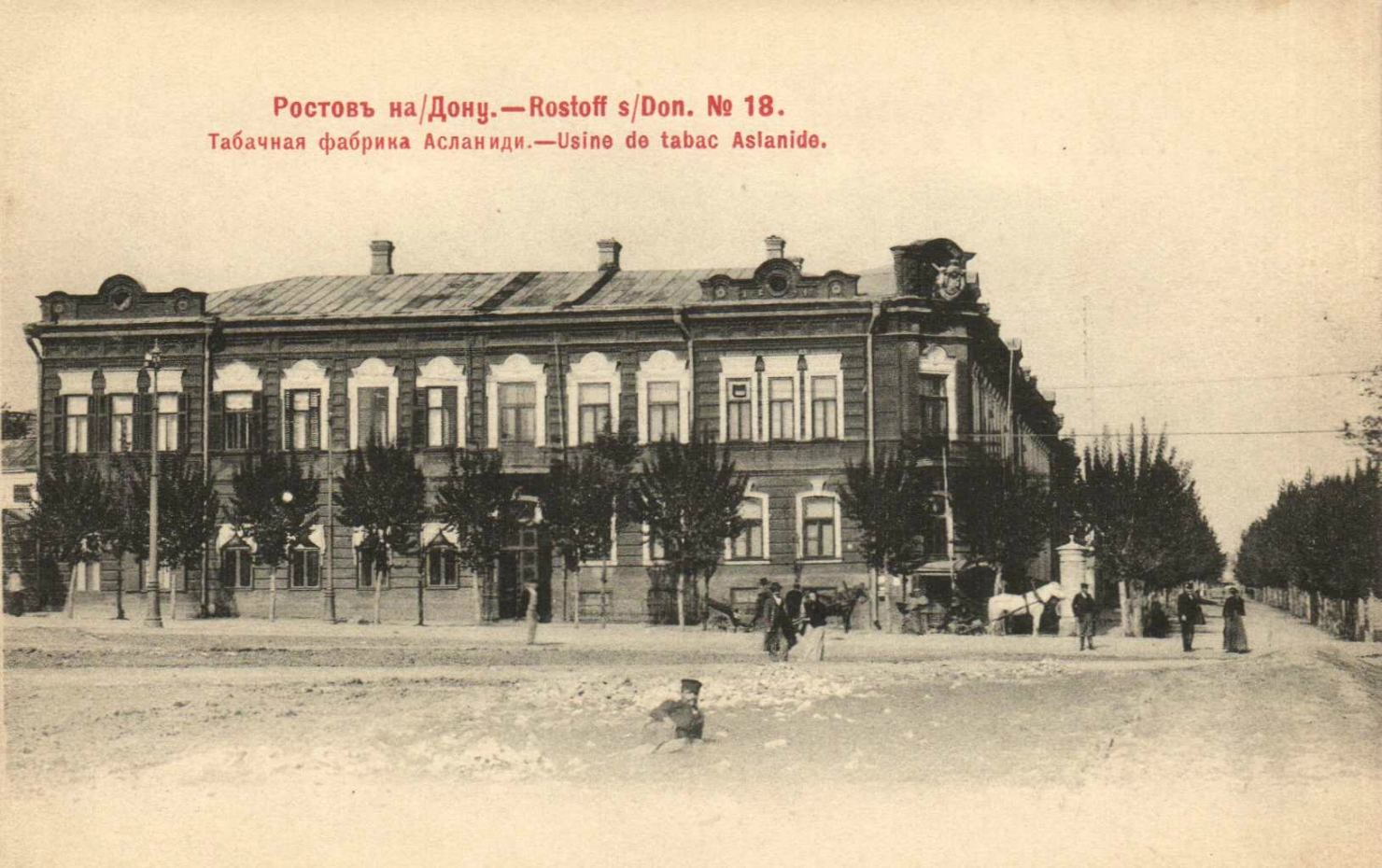 Ростов-на-Дону до Октябрьской революции. Табачная фабрика Асланиди.